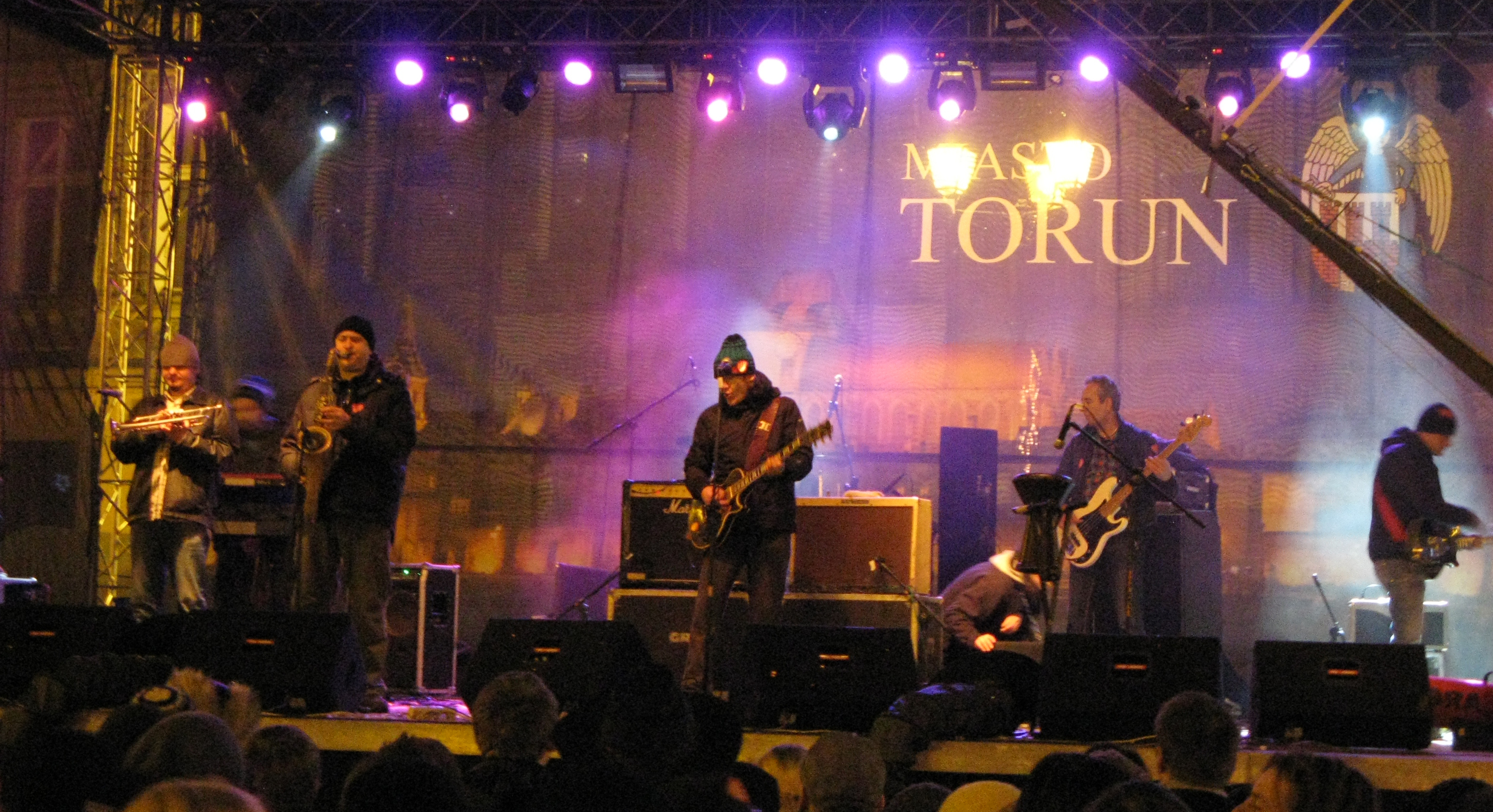 Występ zespołu Daab na 19. Finale Wielkiej Orkiestry Świątecznej Pomocy w Toruniu